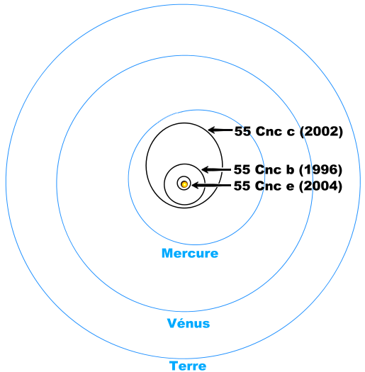 Traduction de que son auteur a placée dans le domaine public. Image:55CncInnerOrbits.svg